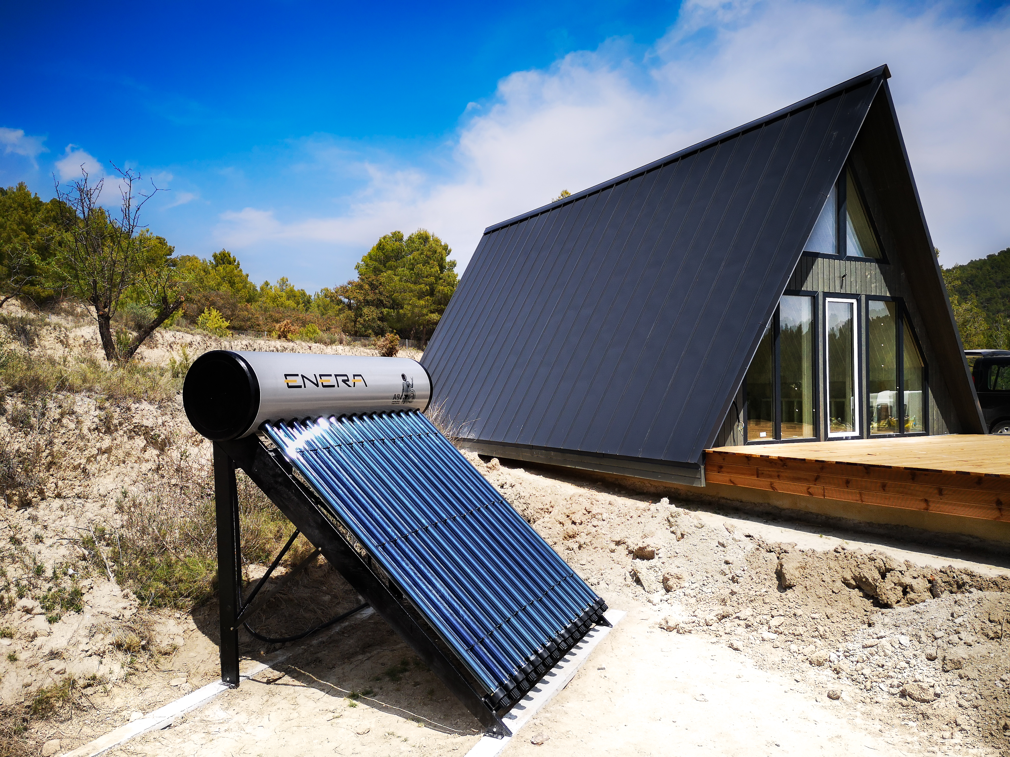 Calentador solar de tubos de vacio - tecnologia nueva y más popular en España.